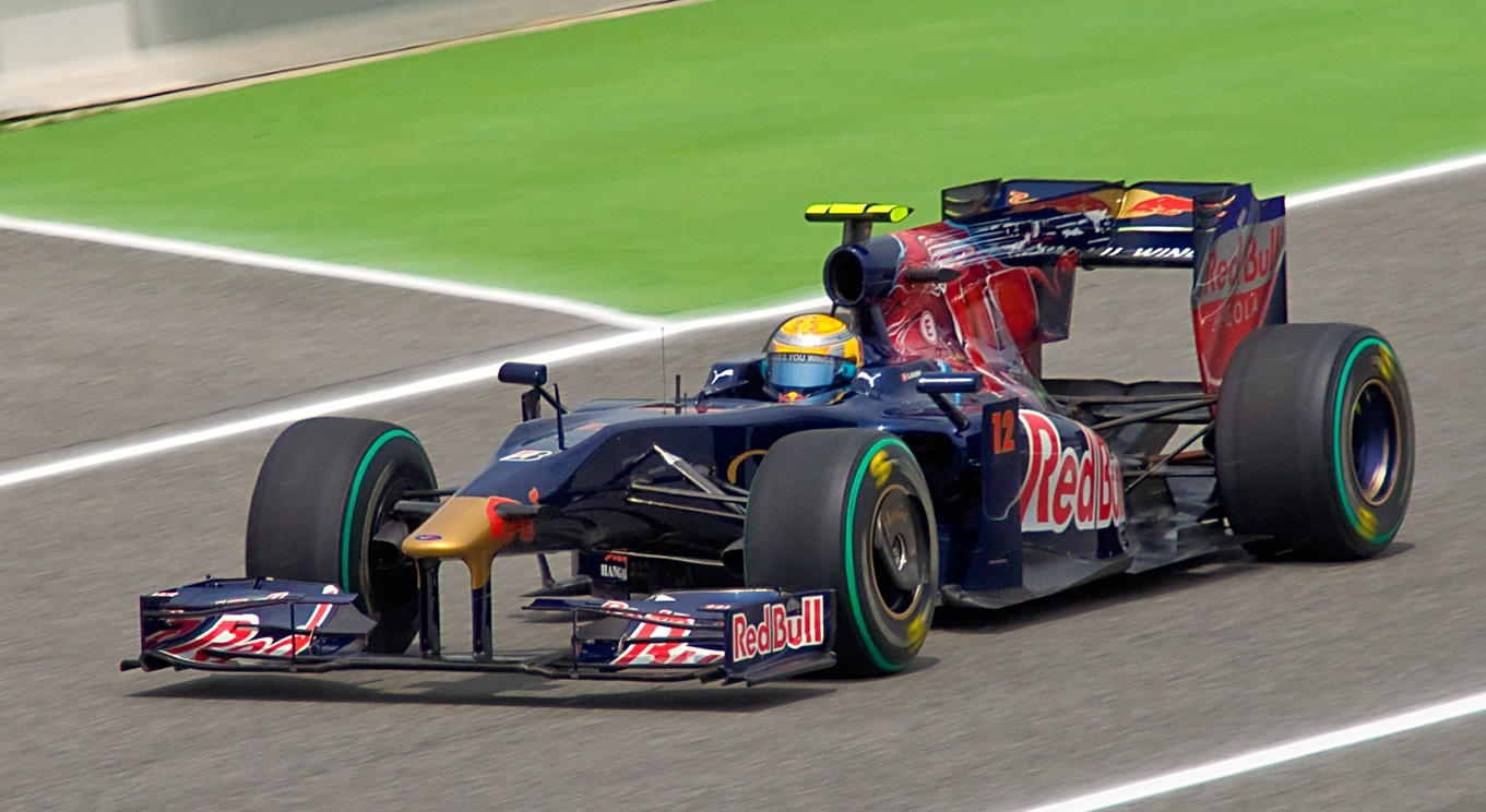 Nikon D90 + Sigma 18-200 DC OS HSM 1/500s - F/13 - 200mm - ISO400